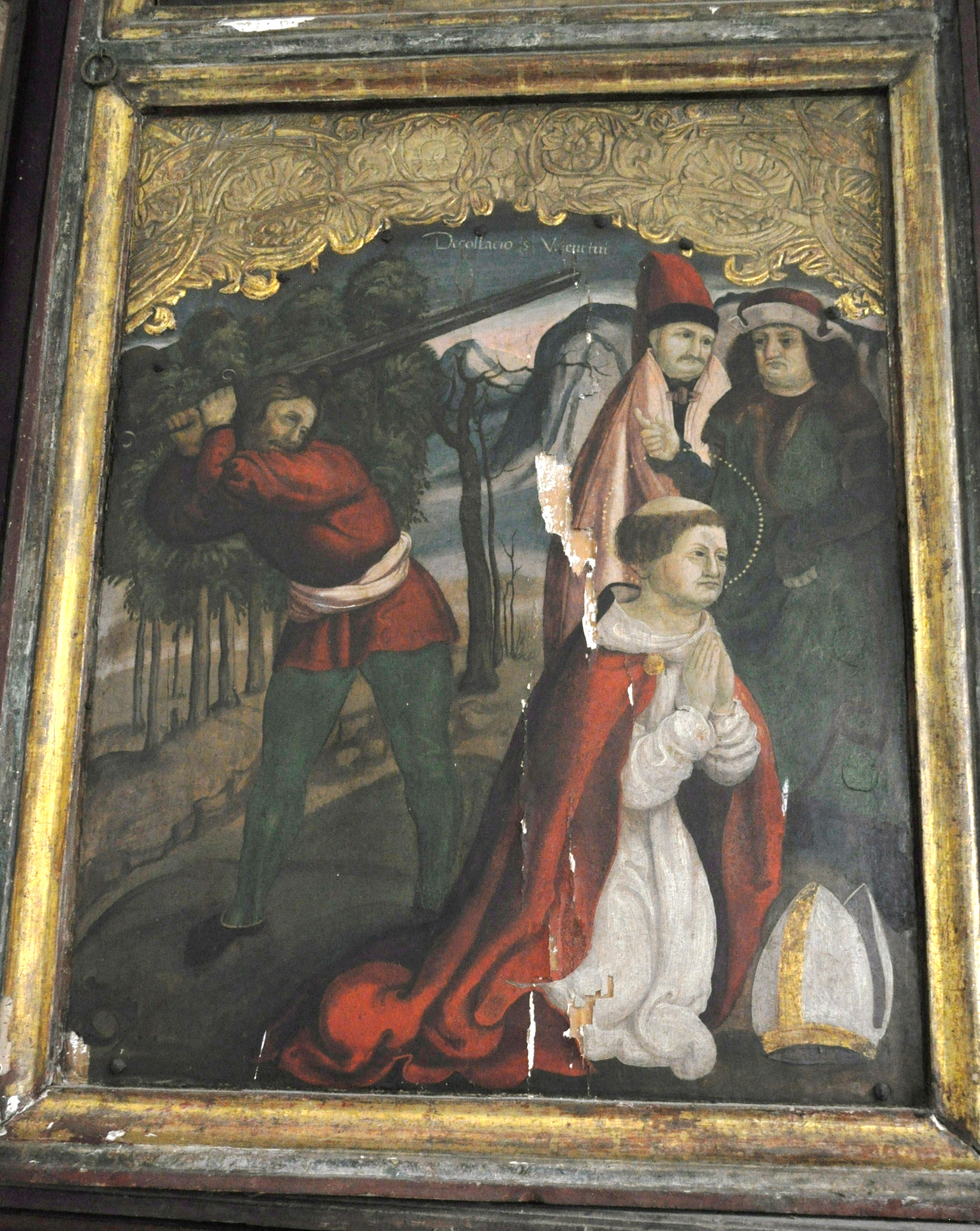 Biserica evanghelică, sat Tătârlaua; comuna Cetatea de Baltă, județul Alba